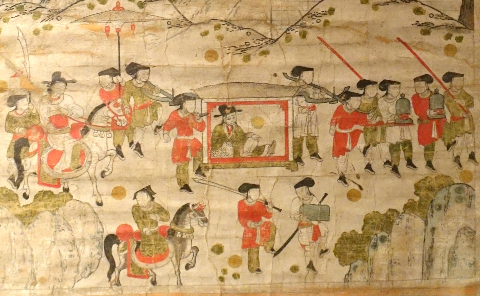 中文（香港）: 文官榮歸圖Tiếng Việt: Văn quan vinh quy đồ